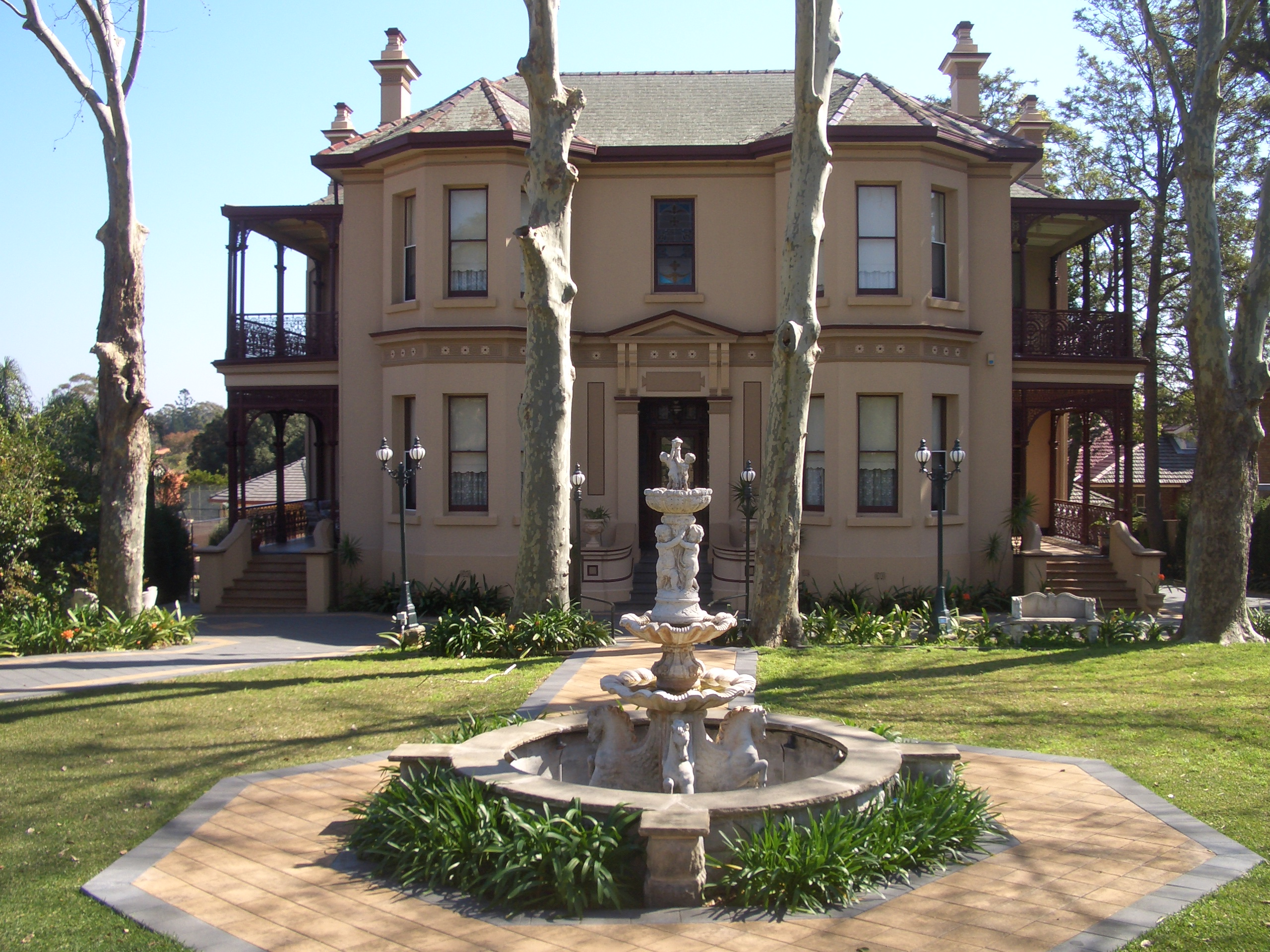 Gayton, Burwood Road, Burwood, Sydney